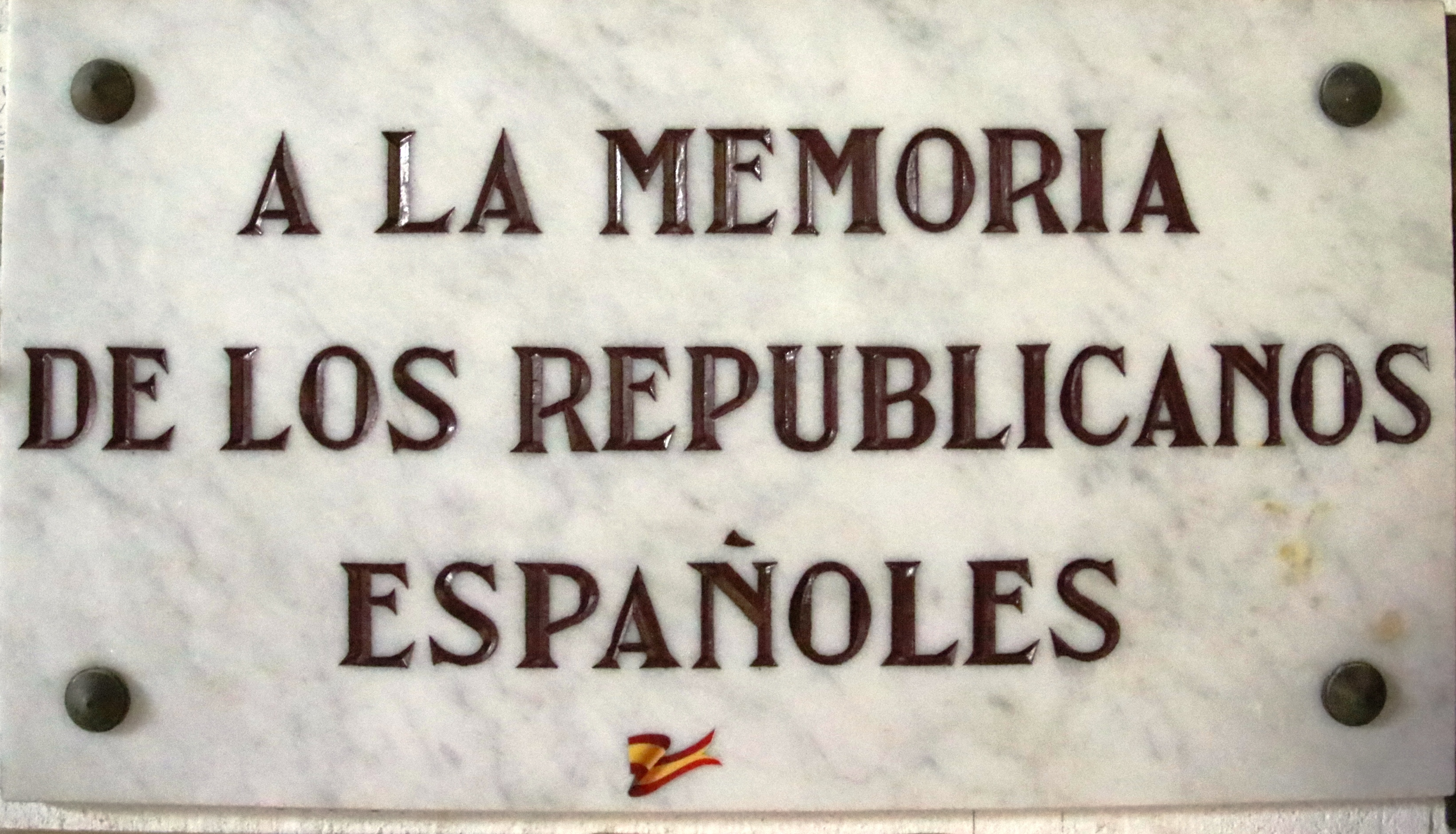 Konzentrationslager Mauthausen